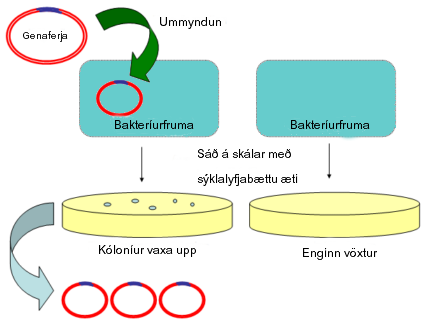 Transformation von Plasmid-DNA in kompetente E. coli-Zellen; anschließende Selektion durch Antibiotika spezifischer Fotograf/Zeichner: Andymuc spezifisches Datum: 05.06.2005